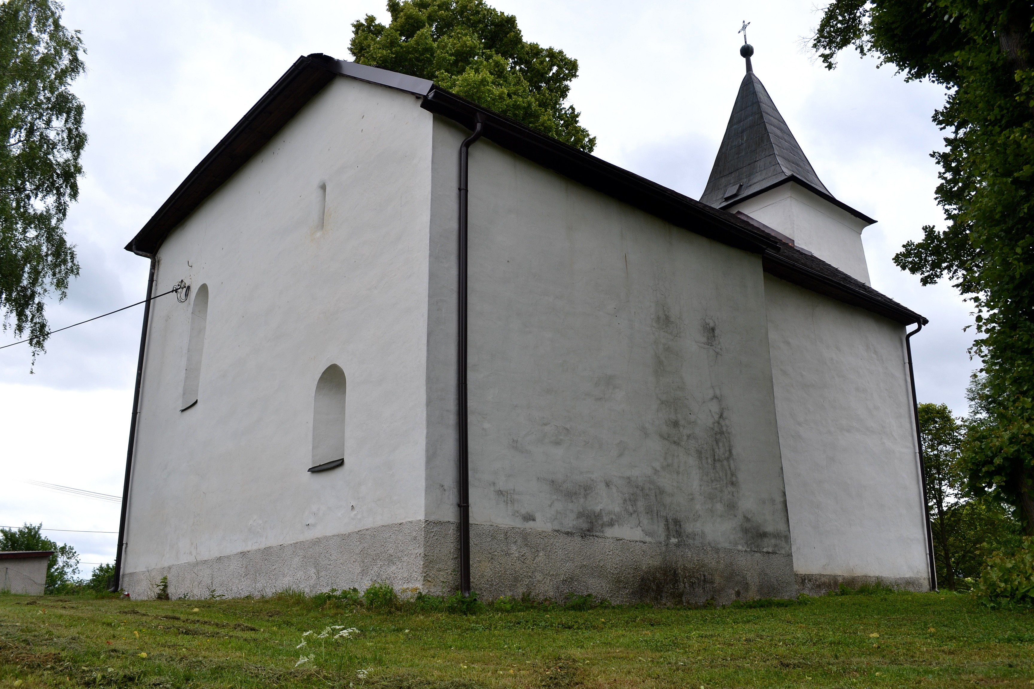 Ivančiná (okr. Turčianske Teplice), Kostol svätého Jána Krstiteľa; pohľad od severovýchodu